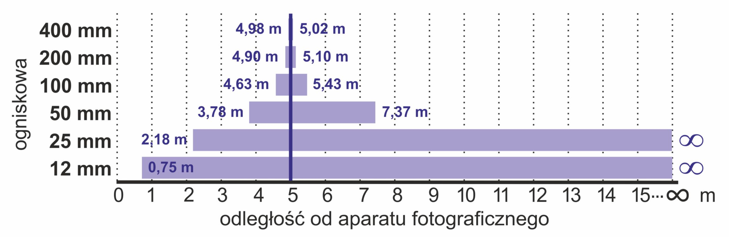 Wykres ilustrujący wpływ ogniskowej na głębię ostrości (matryca full frame, odległość ostrzenia 5 m, przysłona f/5.6)